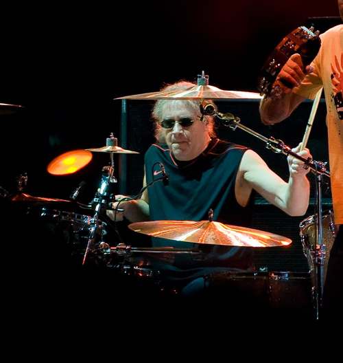 He pegado una mega limpieza de fotos al disco duro y he redescubierto muchas fotos, así que recupero las fotillos del concierto de Deep Purple el la concentracion Harley Davidson Big Twin en el pinar del Grao de Castellon